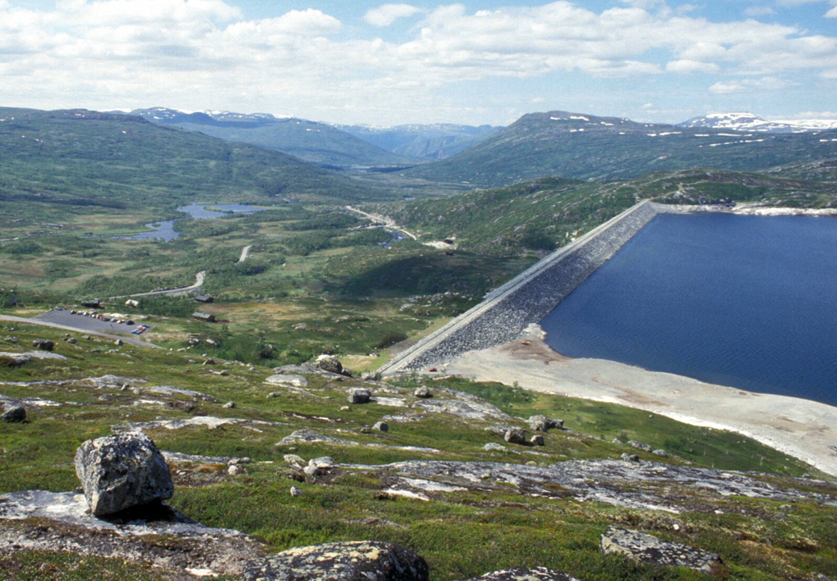 Steinfyllingsdam fra 1980 i Eidfjord, Hardanger. Både ingeniørkunst og turistattraksjon.